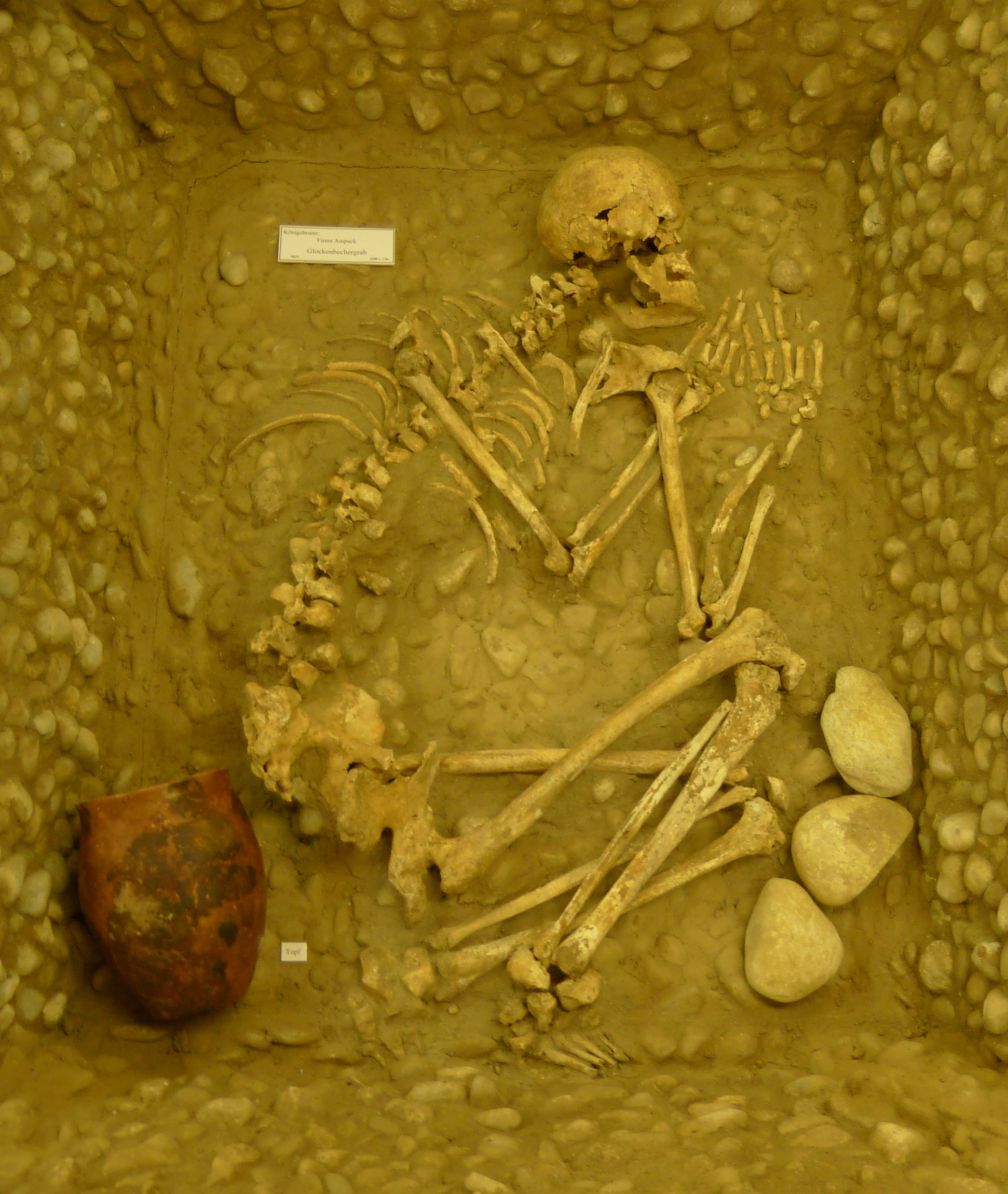 Archäologisches Museum Königsbrunn, "Glockenbechermann" (Hockergrab aus der Glockenbecherkultur).